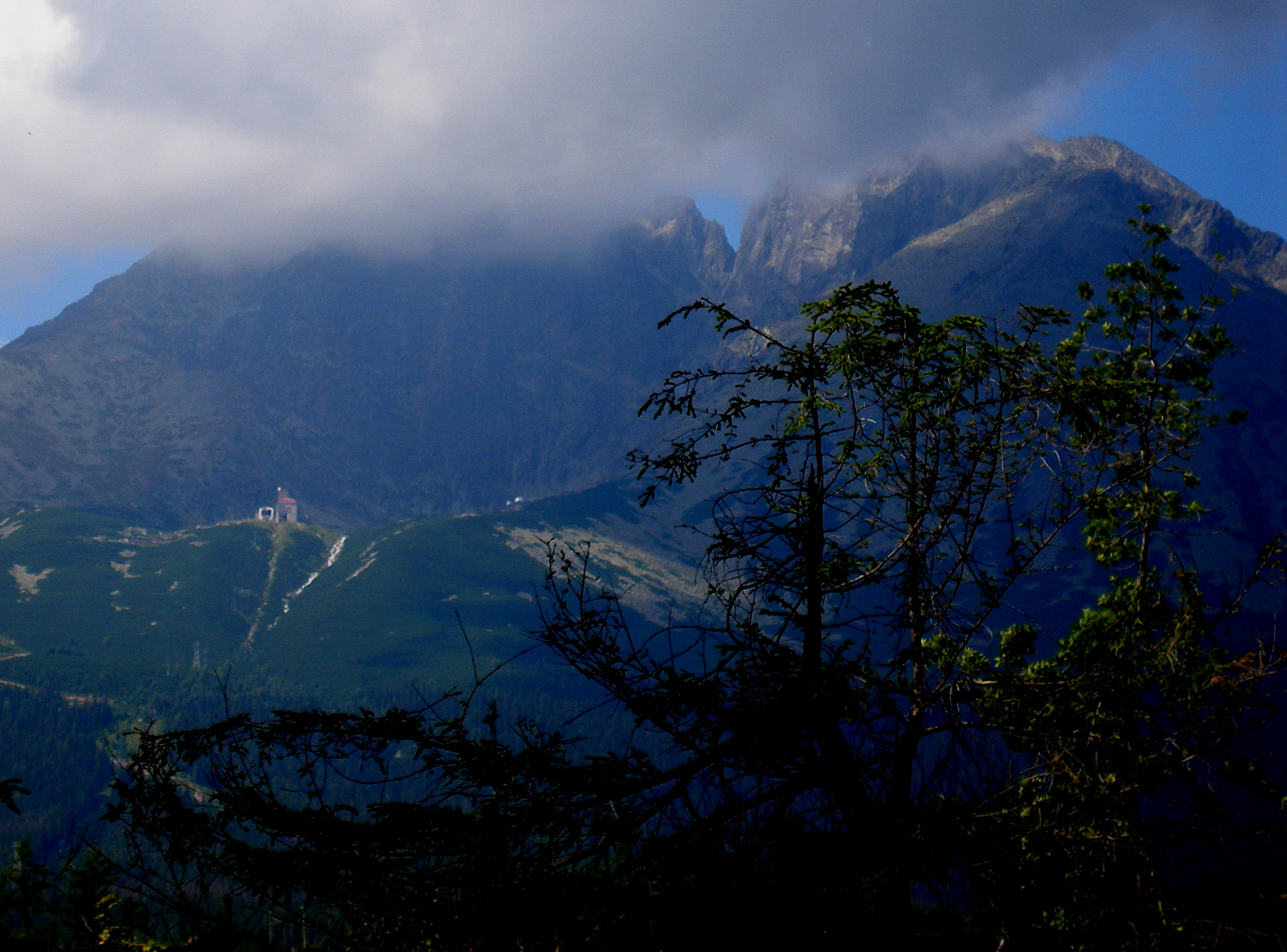 Lomnický štít a Skalnaté pleso pohľad od Tatranskej Lomnice